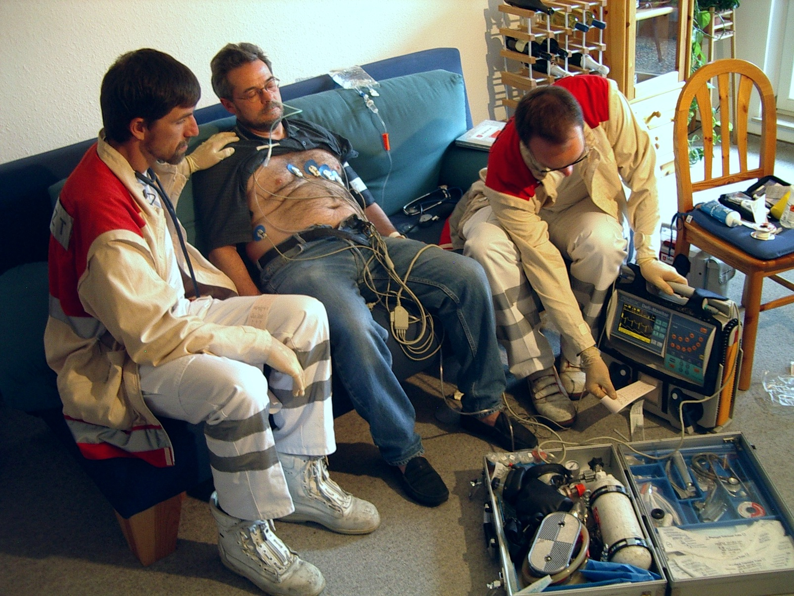 Versorgung eines Notfallpatienten durch eine Rettungsmannschaft des Malteser Hilfsdienstes (Hinweis: Die Szenerie ist gestellt!)